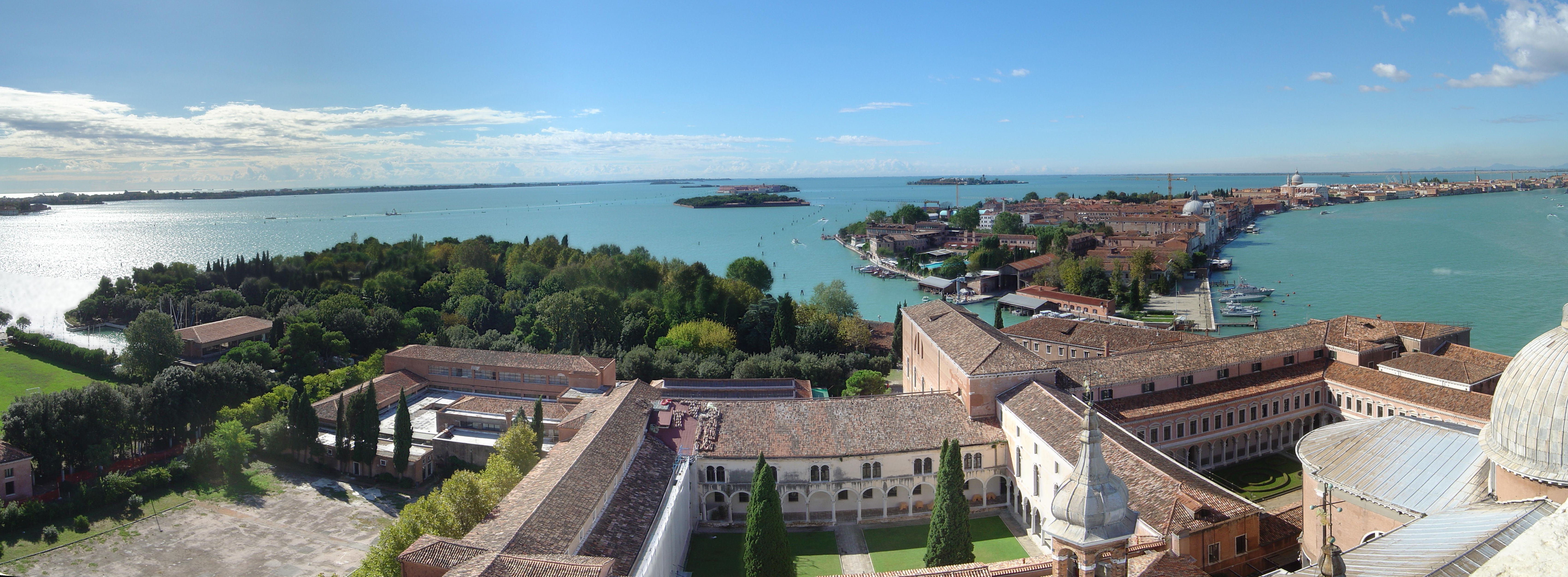 Vue depuis Chiesa di San Giorgio Maggiore